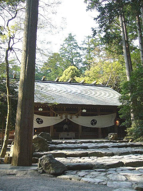 椿大神社 拝殿 2006年5月 Bakkai撮影 Category:神社の画像ja:Category:鈴鹿市の画像